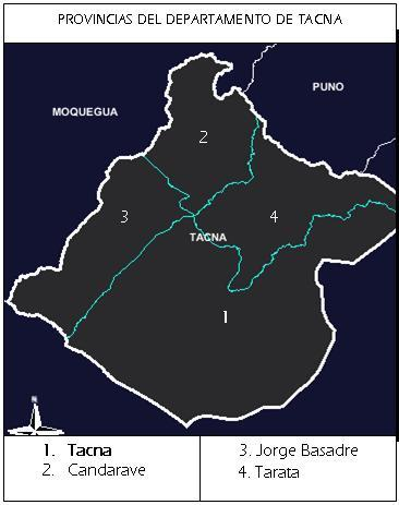 División política de Tacna. Tacna prov. 33